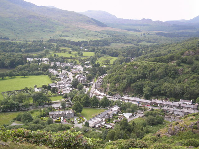 Beddgelert viewed from Mynydd Sygun.